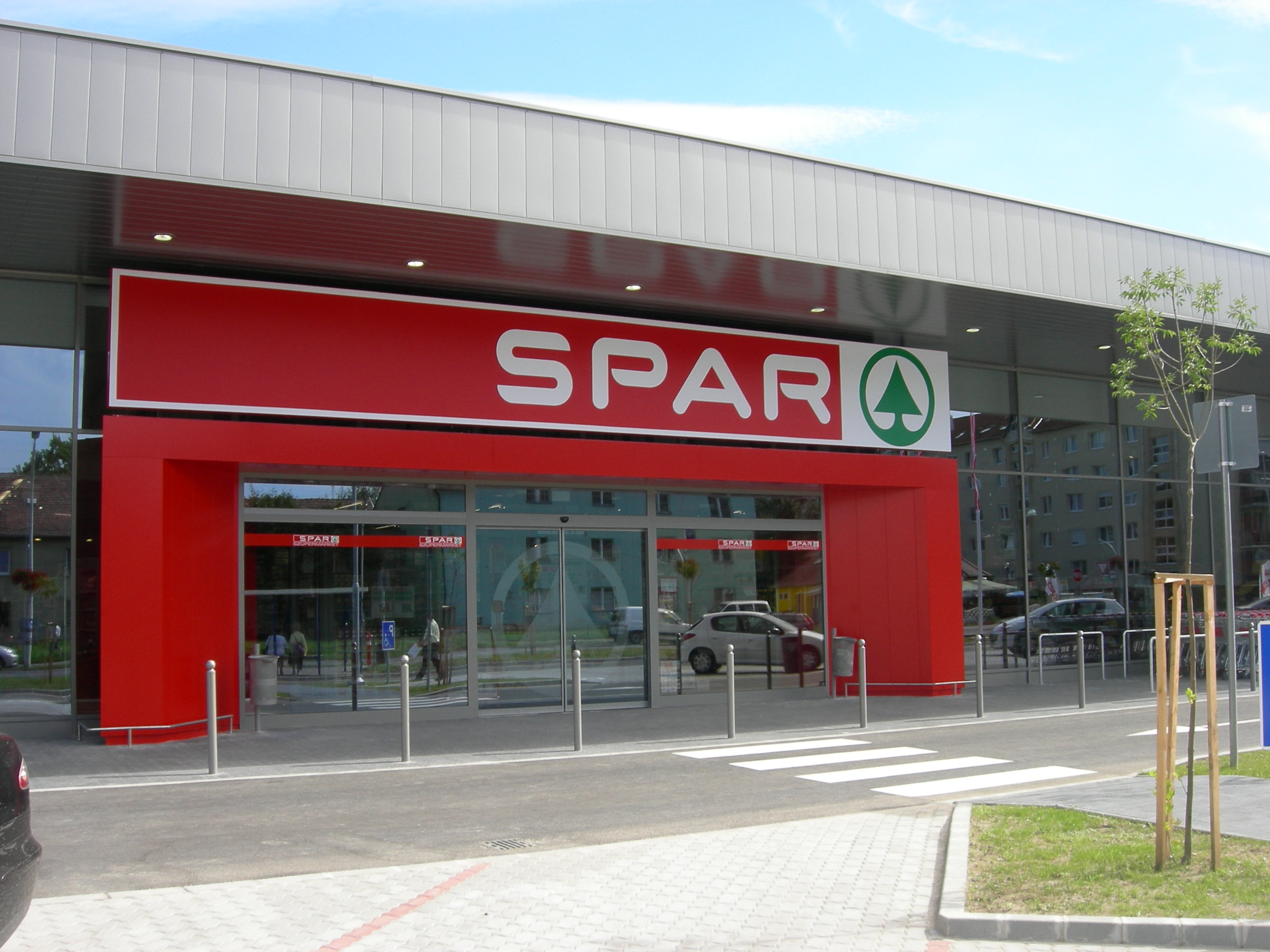 SPAR áruház bejárat